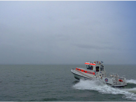 Das Rettungsboot der Wasserwacht Chieming "Graf Chiemo" auf dem Weg zu einem Einsatz